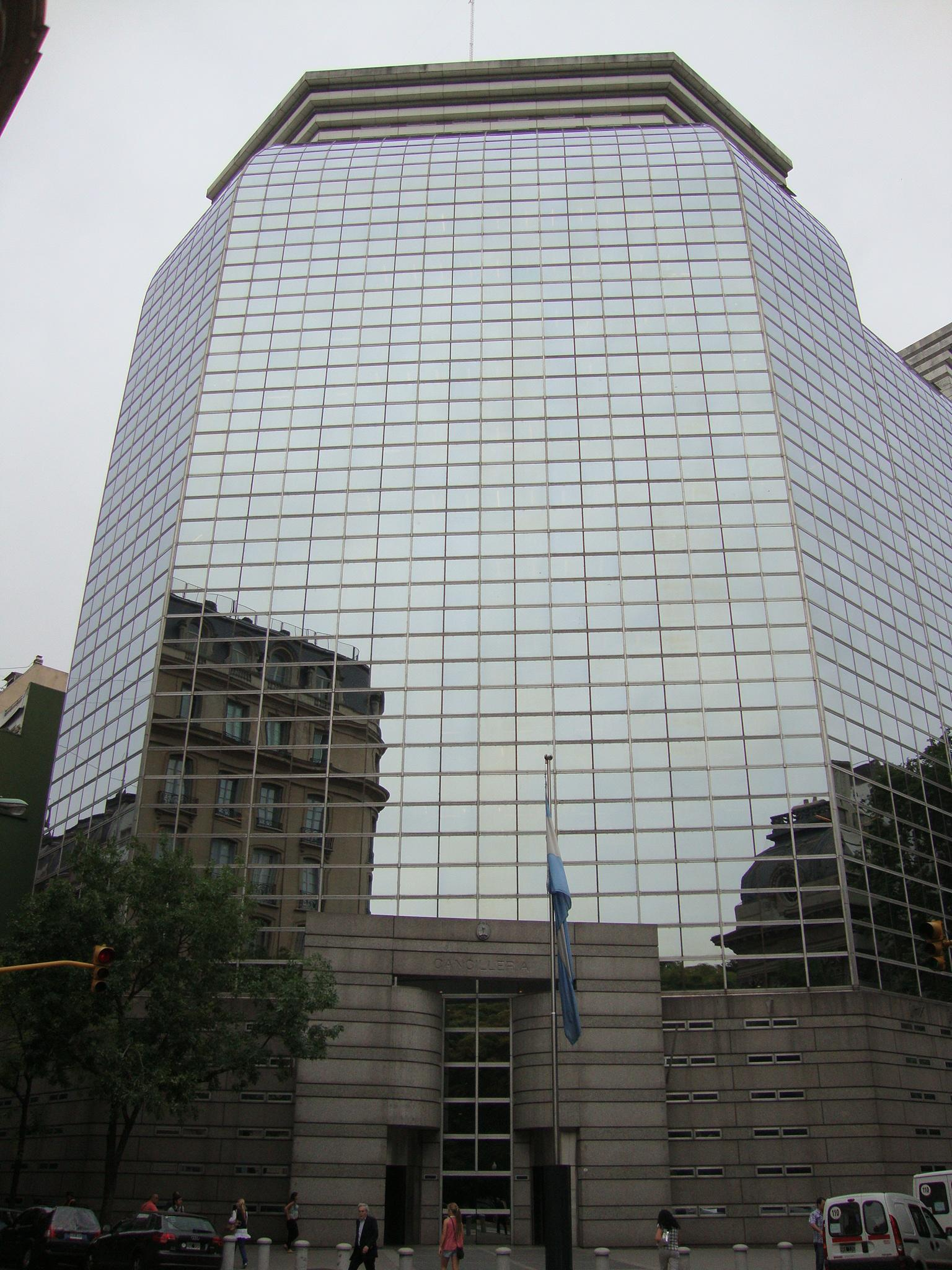 Edificio de la Cancillería de la República Argentina. Sede del Ministerio de Relaciones Exteriores, Comercio Internacional y Culto en la Ciudad Autónoma de Buenos Aires, Argentina.